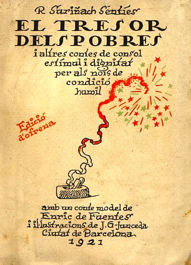 Portada del "Tresor dels pobres" de Ramon Suriñach Sentíes